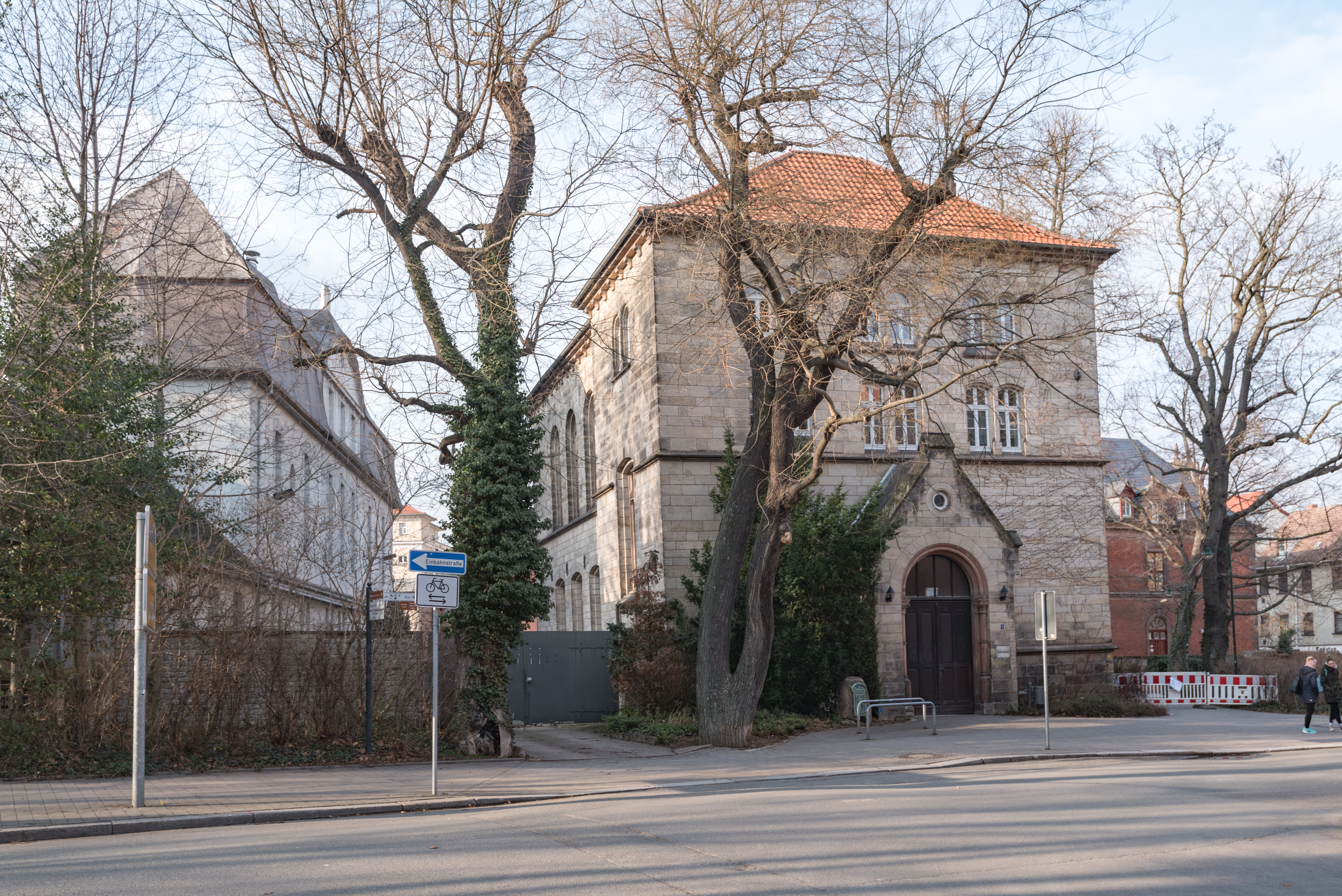 Weißenfels, Am Kloster 1